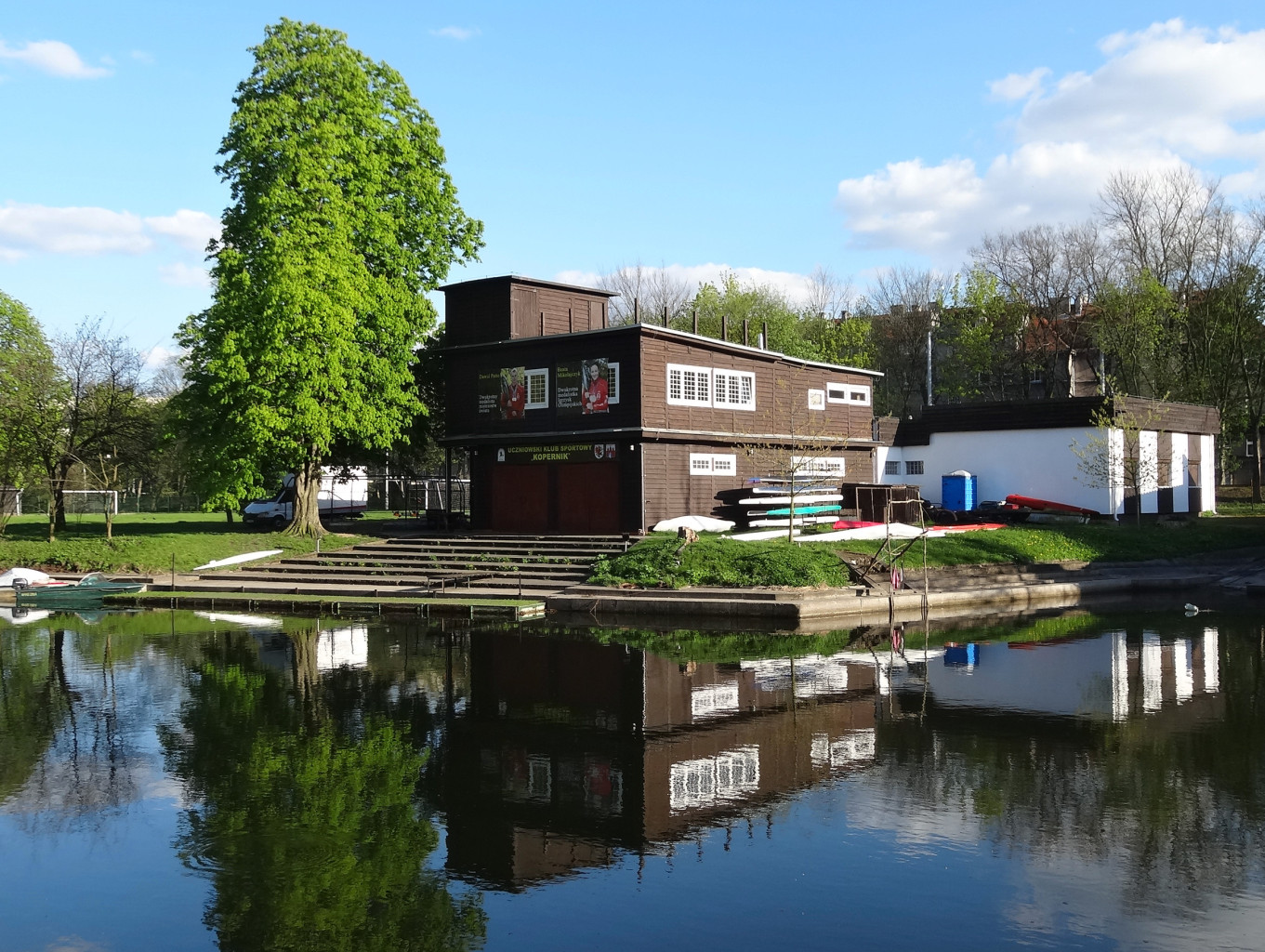 Przystań Uczniowskiego Klubu Sportowego Kopernik w Bydgoszczy